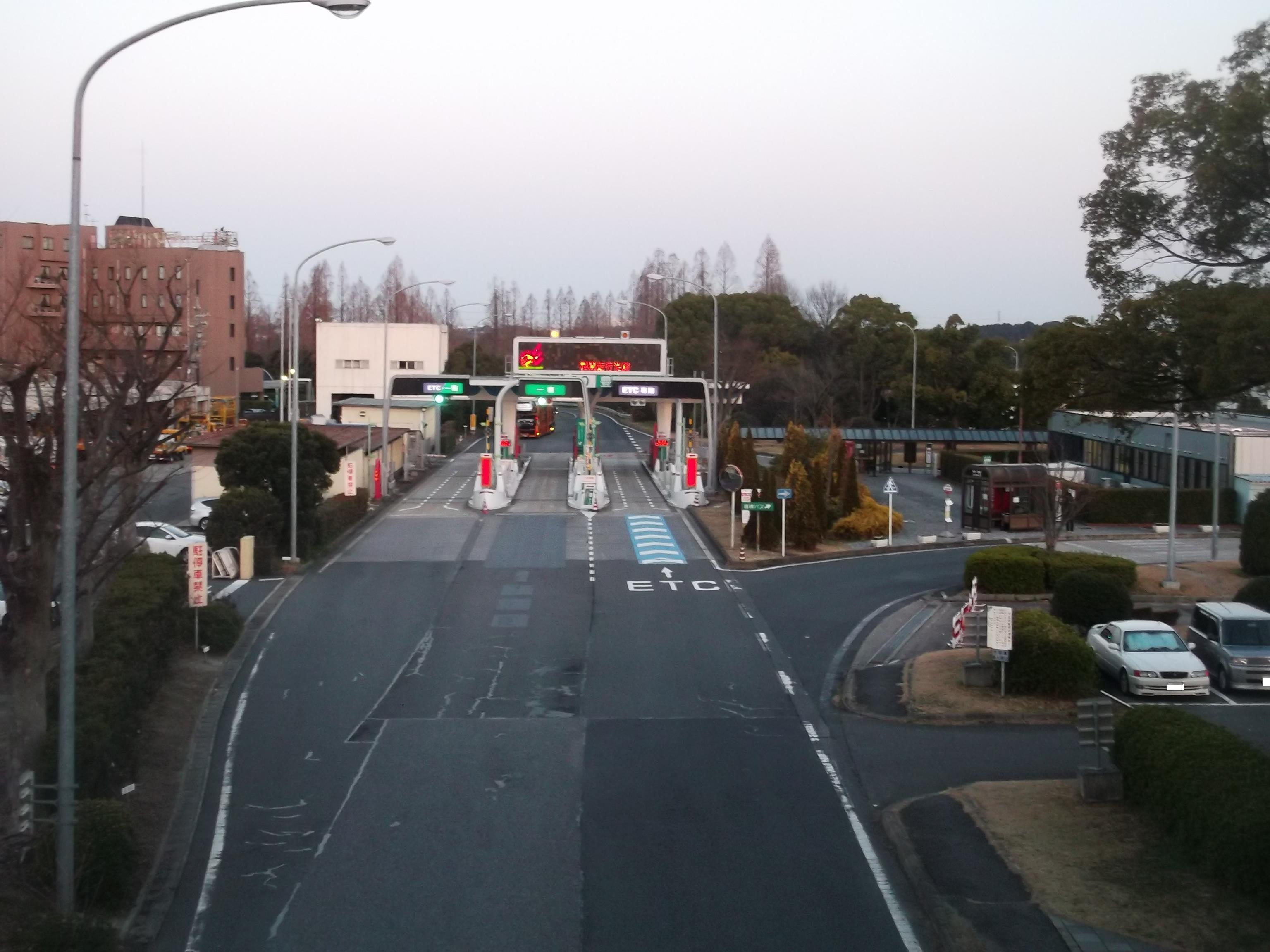 豊田インターチェンジ入口